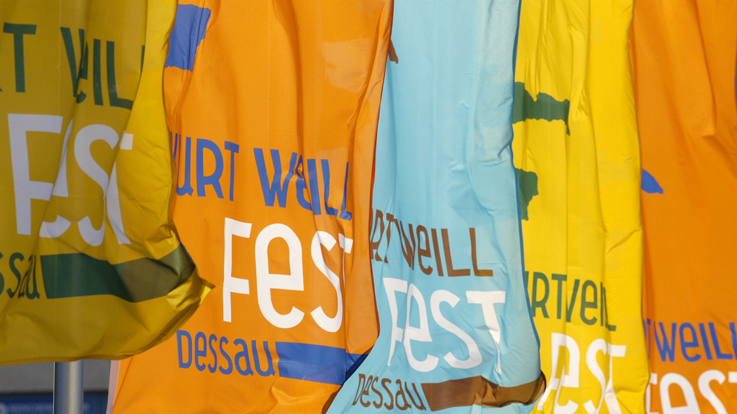 Deutschland, DEU, Dessau, 2006, 14. Kurt Weill Fest Dessau, Fahnen des Kurt Weill Festes im Dessauer Stadtraum, [(c) Kai Bienert, Albrechtstr. 22, 10117 Berlin, Tel: 030 4719696, Mobil: 0171 5418507, , Bankverbindung: Deutsche Bank 24, BLZ: 10070024, KTO: 2067650, IBAN: DE83100700240206765000, BIC(SWIFT):DEUTDEDBBER, Finanzamt Mitte-Tiergarten, StNr.:3422953266, UST-ID:DE137081101, Nutzung nur gegen Honorar und Copyrightnennung! Ausnahme: Berichterstattung ueber das Kurt-Weill-Fest 2006.